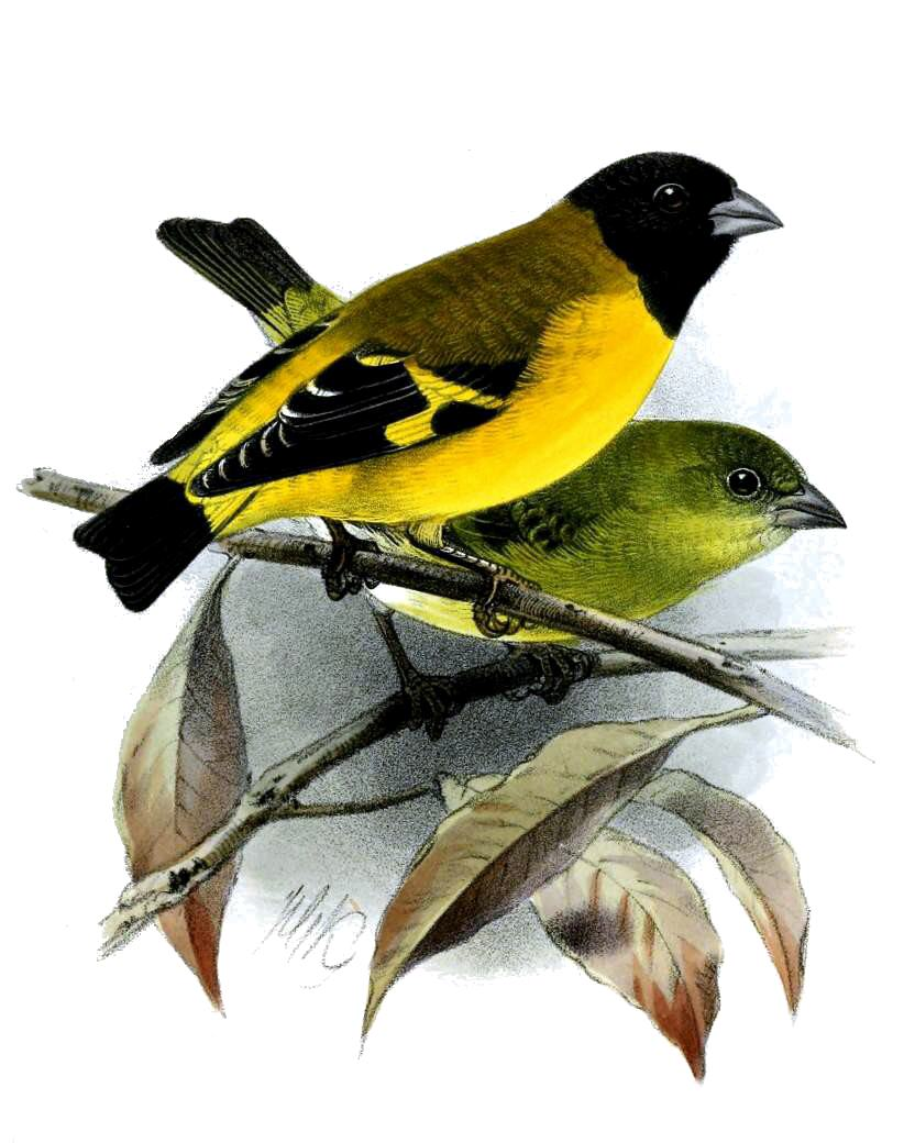 Chrysomitris siemiradzkii =Carduelis siemiradzkii